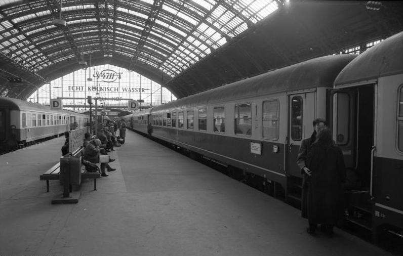 10.2.1989 Hauptbahnhof Köln, Reiseverkehr